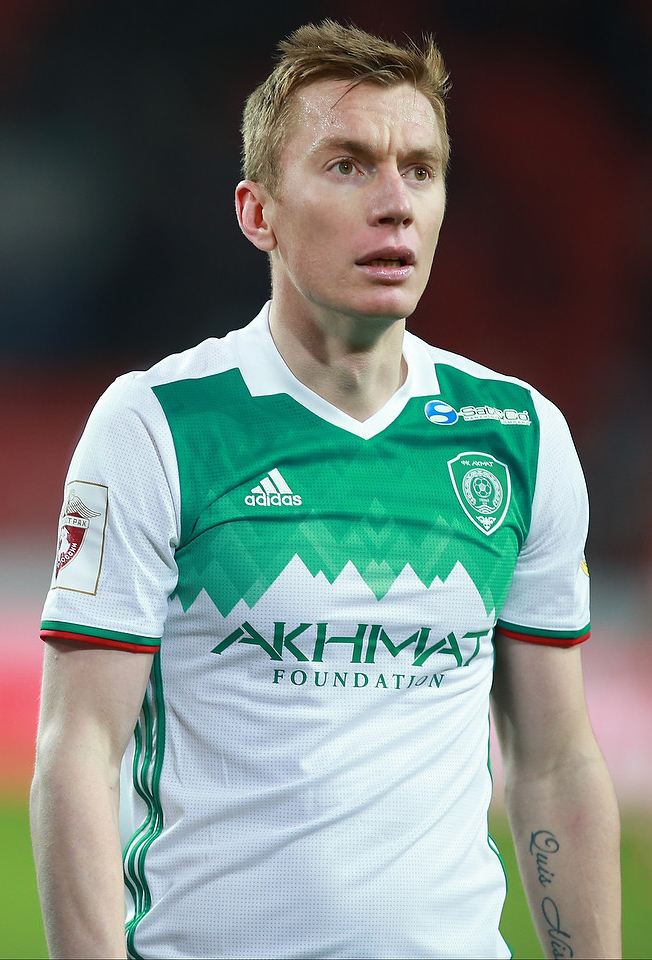 «Спартак» проиграл «Ахмату» и практически лишился шансов на чемпионство